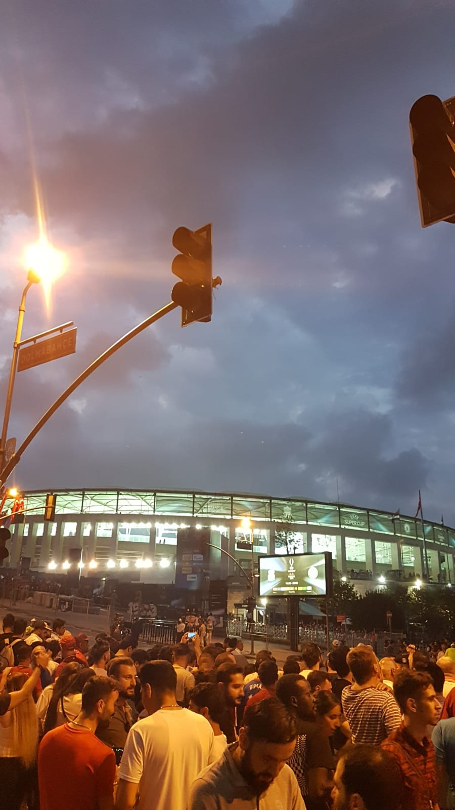 Liverpool vs. Chelsea UEFA Süper Kupa maçı öncesinde Vodafone Park.